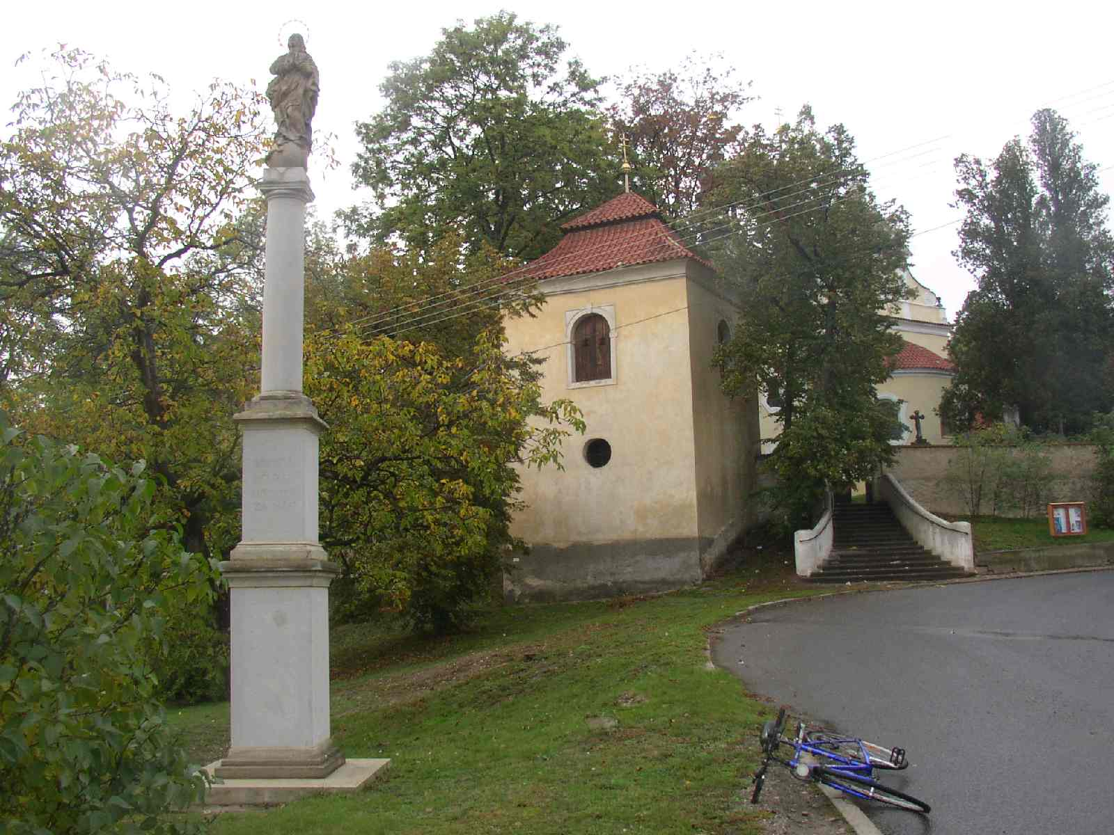 Sloup se sochou Panny Marie z roku cs:1713 v Cítově. Nápis na podstavci praví: SVATÁ MARIA ORODUJ ZA NÁS Vyfotografoval Miaow Miaow v říjnu 2004